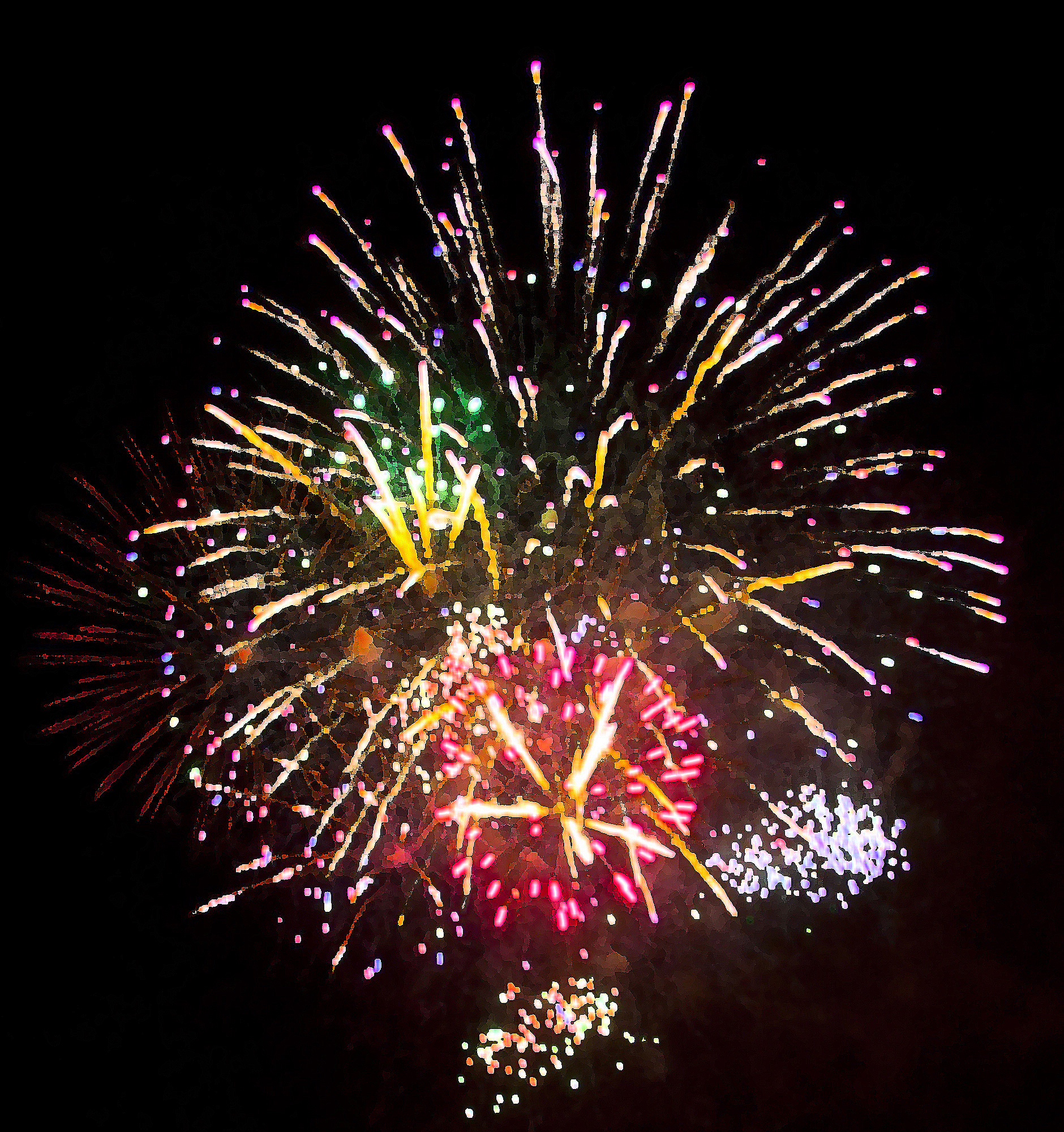 Firework